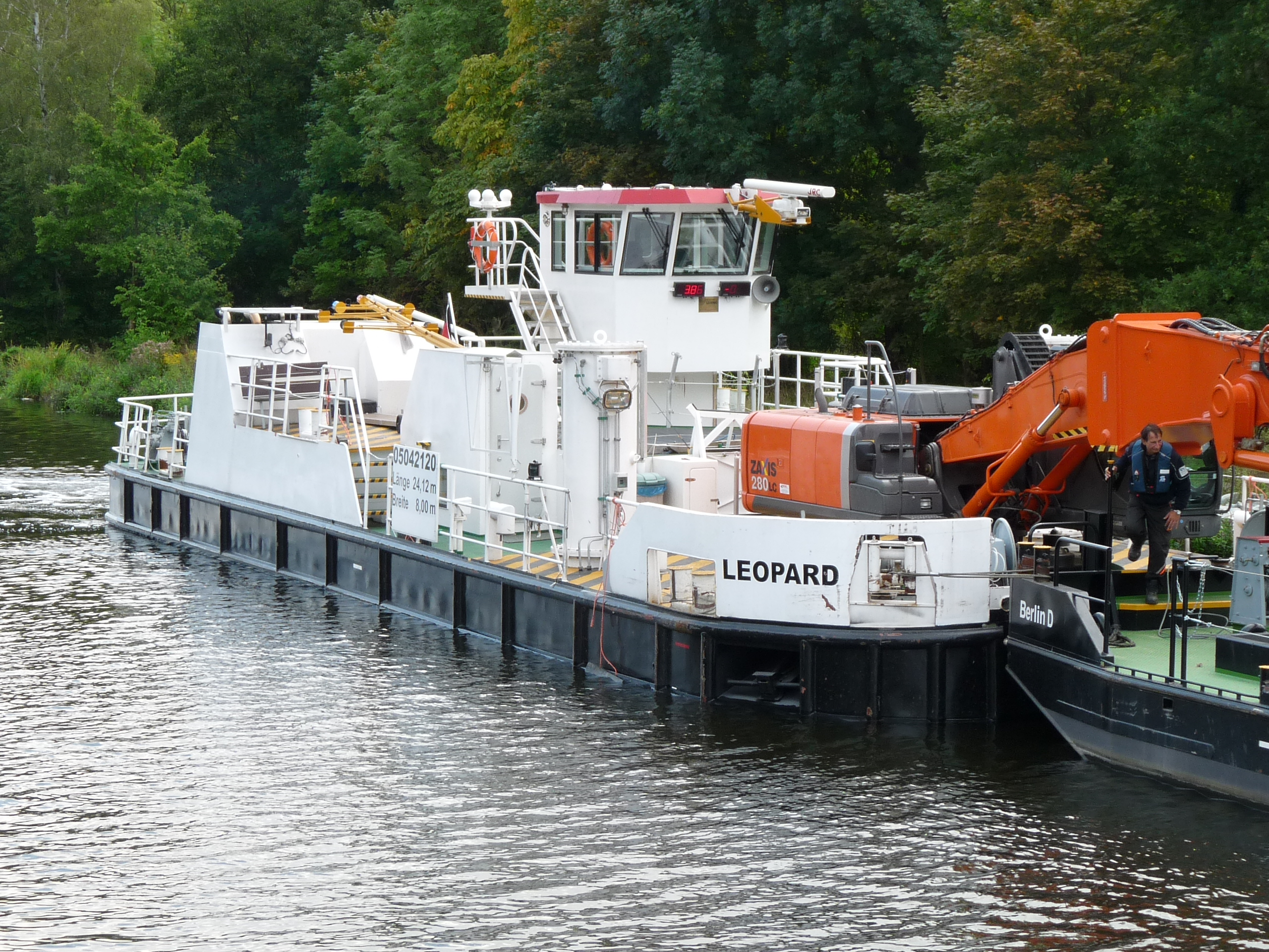 Das Faaborg Systemschiff (Faaborg System Ship, FSS) ist ein modularer Arbeitsschiffstyp, der von der dänischen Faaborg Værft entwickelt und gebaut worden ist. Bei den deutschen Wasser- und Schifffahrtsämtern (WSA) sind seit 2009 Schiffe dieses Typs im Einsatz. Hier das Schiff Leopard im Oberwasser der Schleuse Kleinmachnow.